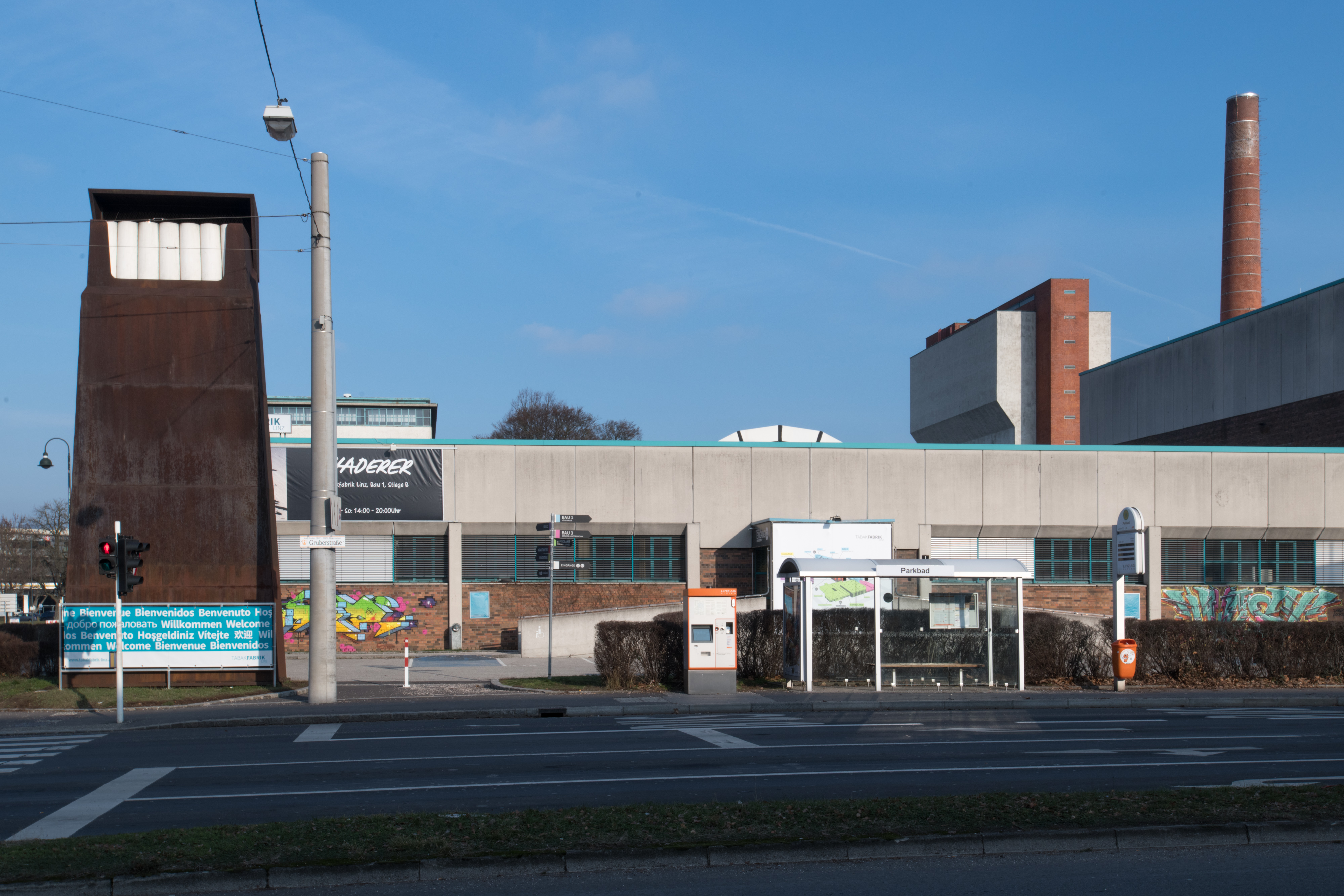 Skulptur in Linz